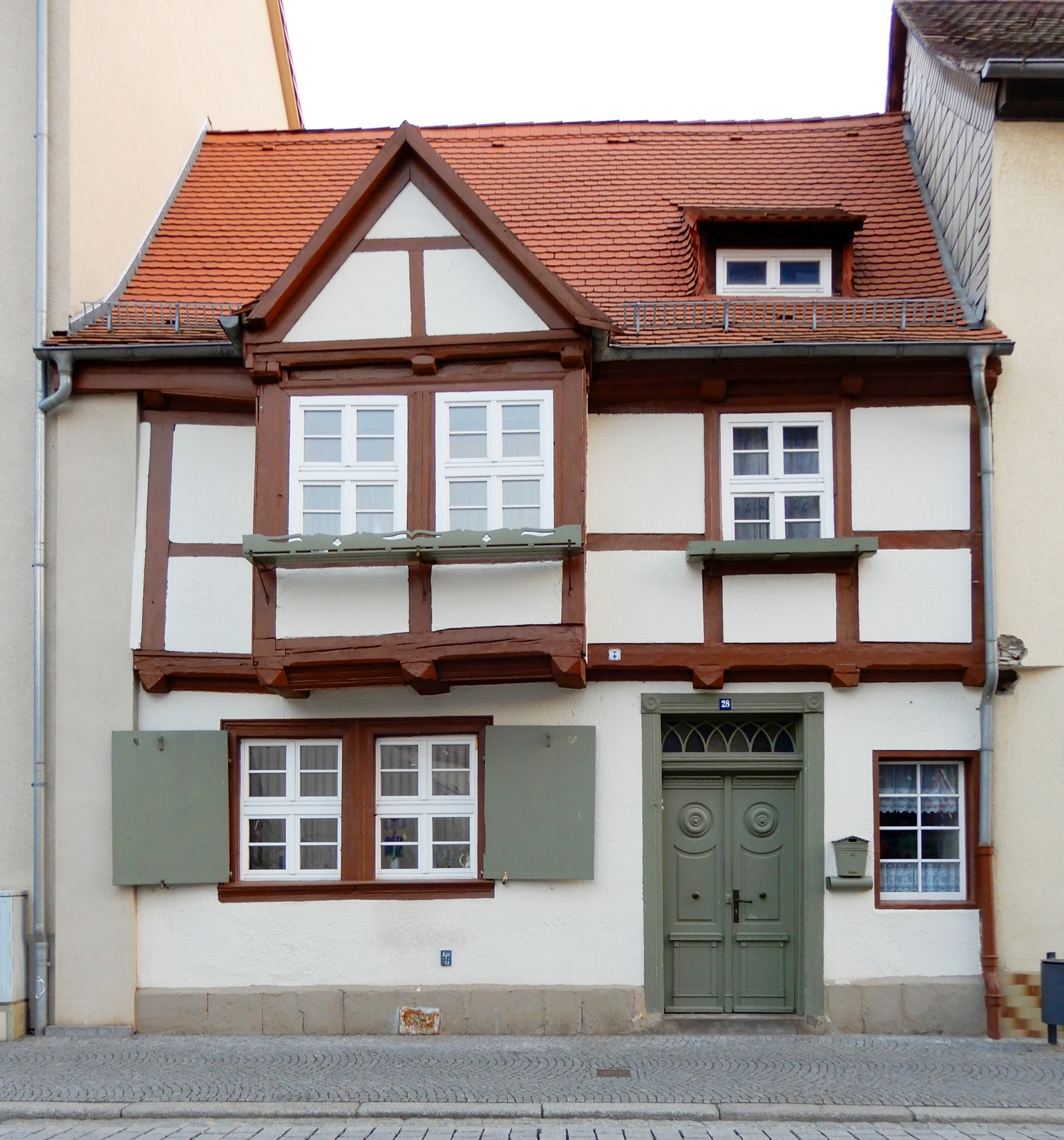 Gebäude Über den Steinen 28 in Aschersleben